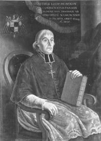 Claude Léopold de Bexon (1736-1807) - bisschop van Namur (1802-1803)- België